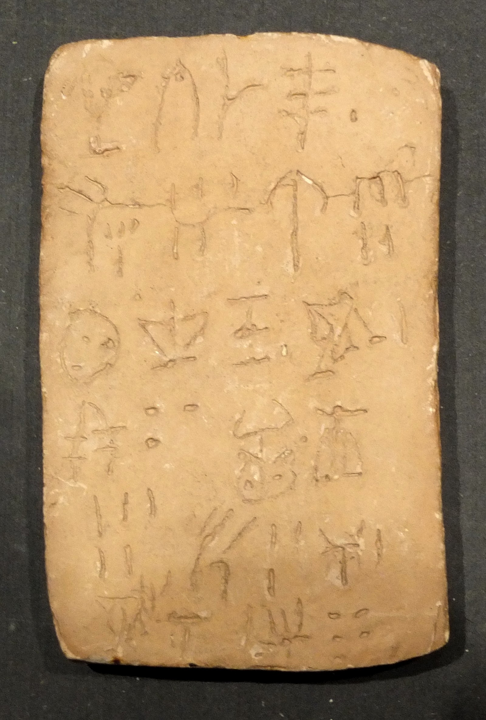 Tablette recouverte d'une inscription en "linéaire A" (Minoen récent I B) découverte lors de fouilles à Haghia Triada entre 1902 et 1912, vers 1500 av J.C. - Copie en plâtre peint du début du XXeme siècle, musée du Louvre. Exposé au musée d'archéologie nationale de Saint-Germain-en-Laye lors de l'exposition La Grèce des origines.